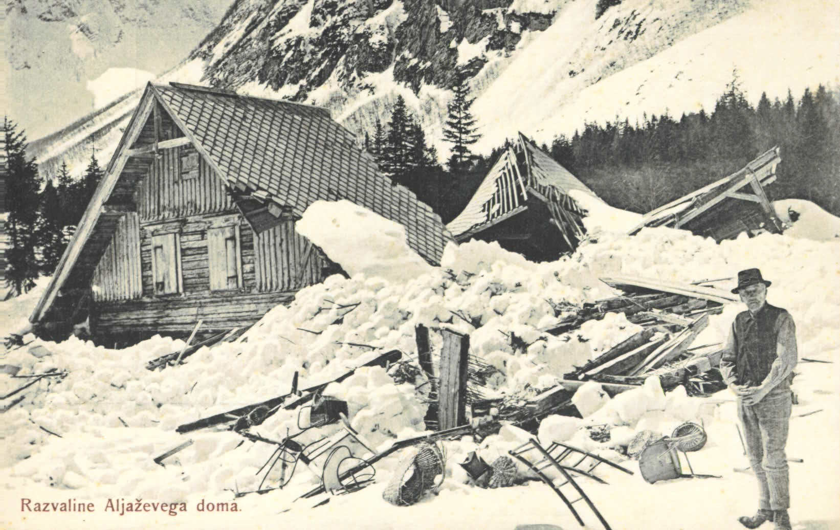 Razglednica razvalin Aljaževega doma.